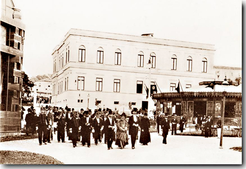 A Inauguração Solene da Exposição de 1901. Momento em que o Presidente do estado Borges de Medeiros entrava no recinto da exposição dando inicio a mesma. A seu lado está o Arcebispo D. Claudio José Gonçalves Ponce de Leon e ao lado deste, o Embaixador americano no Brasil, Charles Bryan Page.